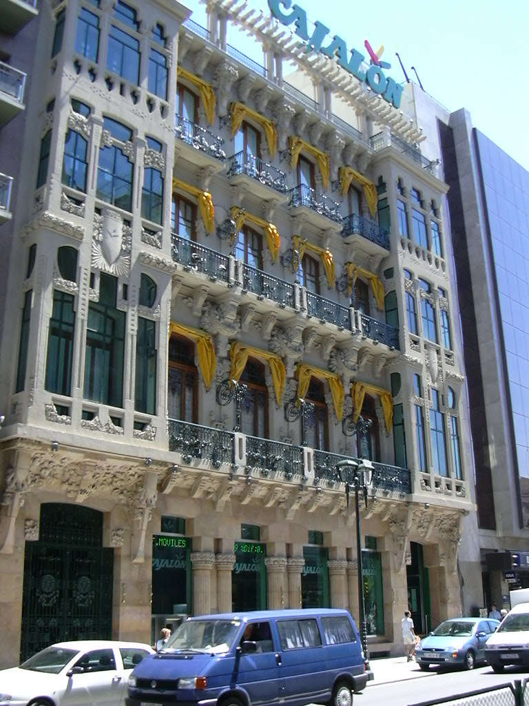 Zaragoza - Casino Mercantil - Edificio modernista de 1912 - 1914